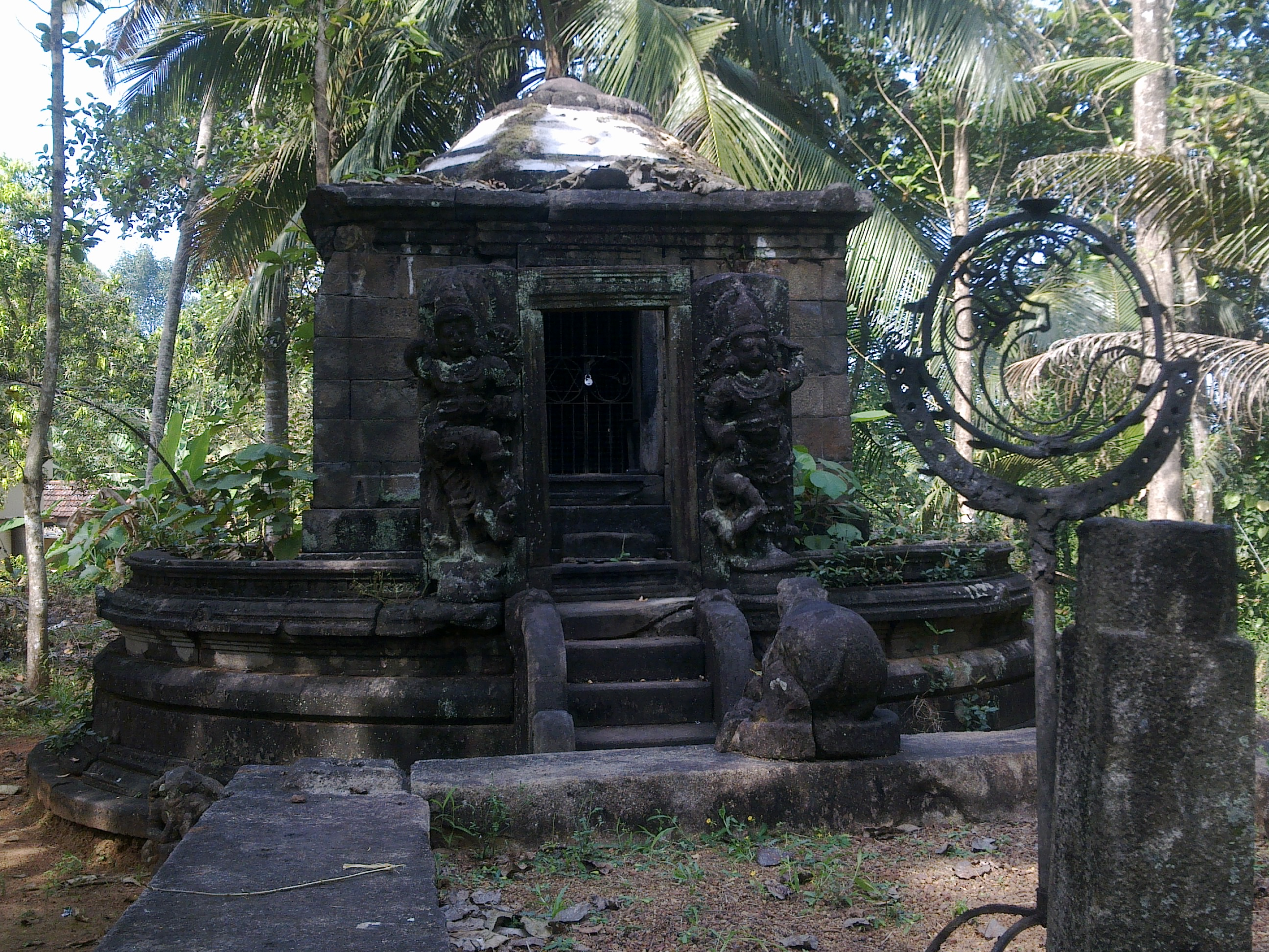 വാഴപ്പള്ളി ശാലഗ്രാമം ശിവക്ഷേത്രം